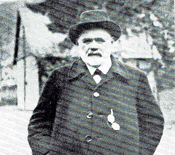 Ausschnittsvergrößerung Paul Guder, ca. 1920